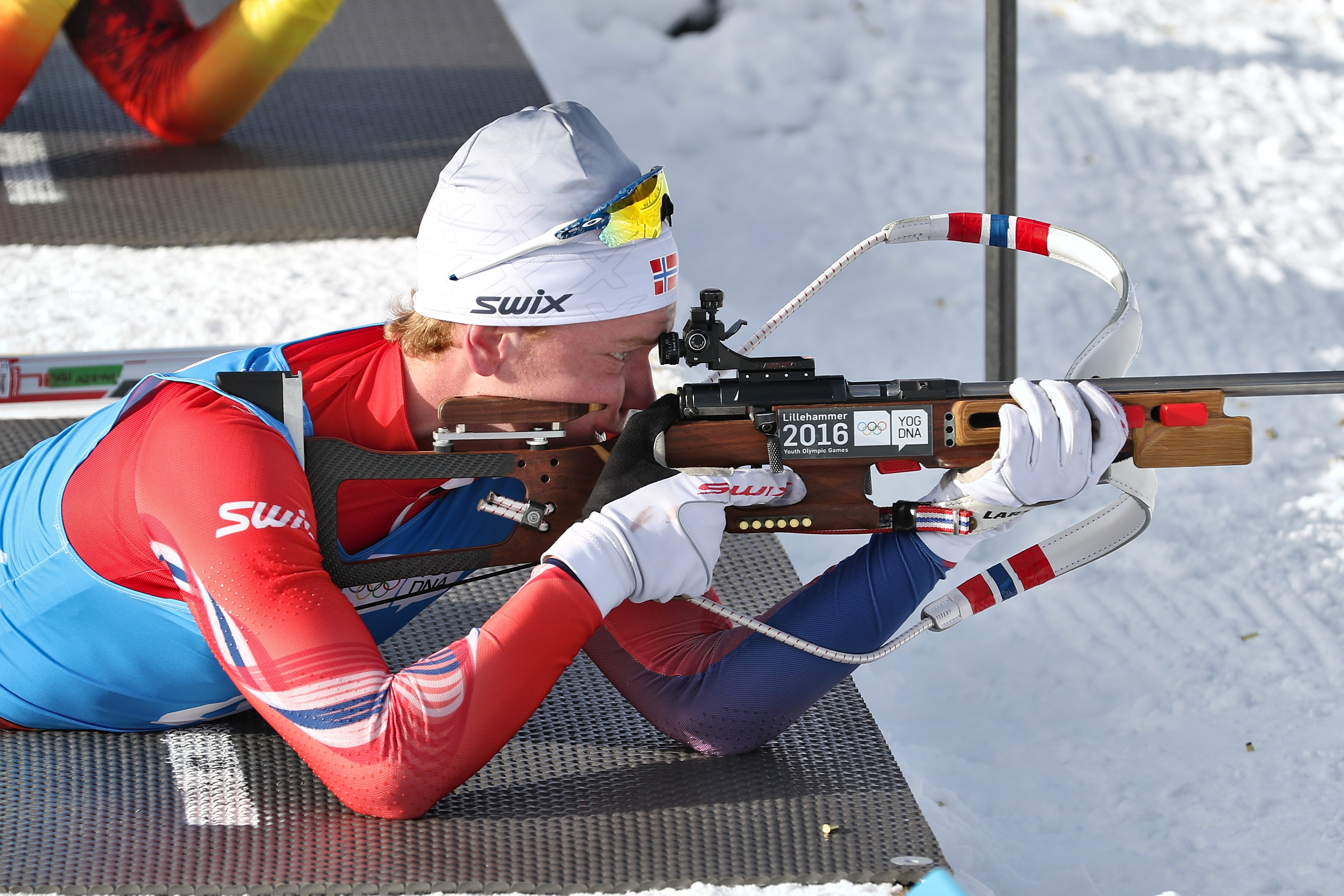 Lillehammer 2016 Biathlon mixed relay, Sivert Guttorm Bakken (NOR)